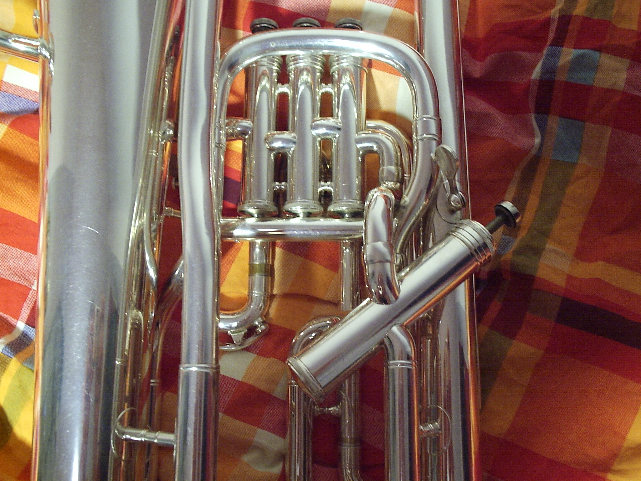 Kwartventiel euphonium